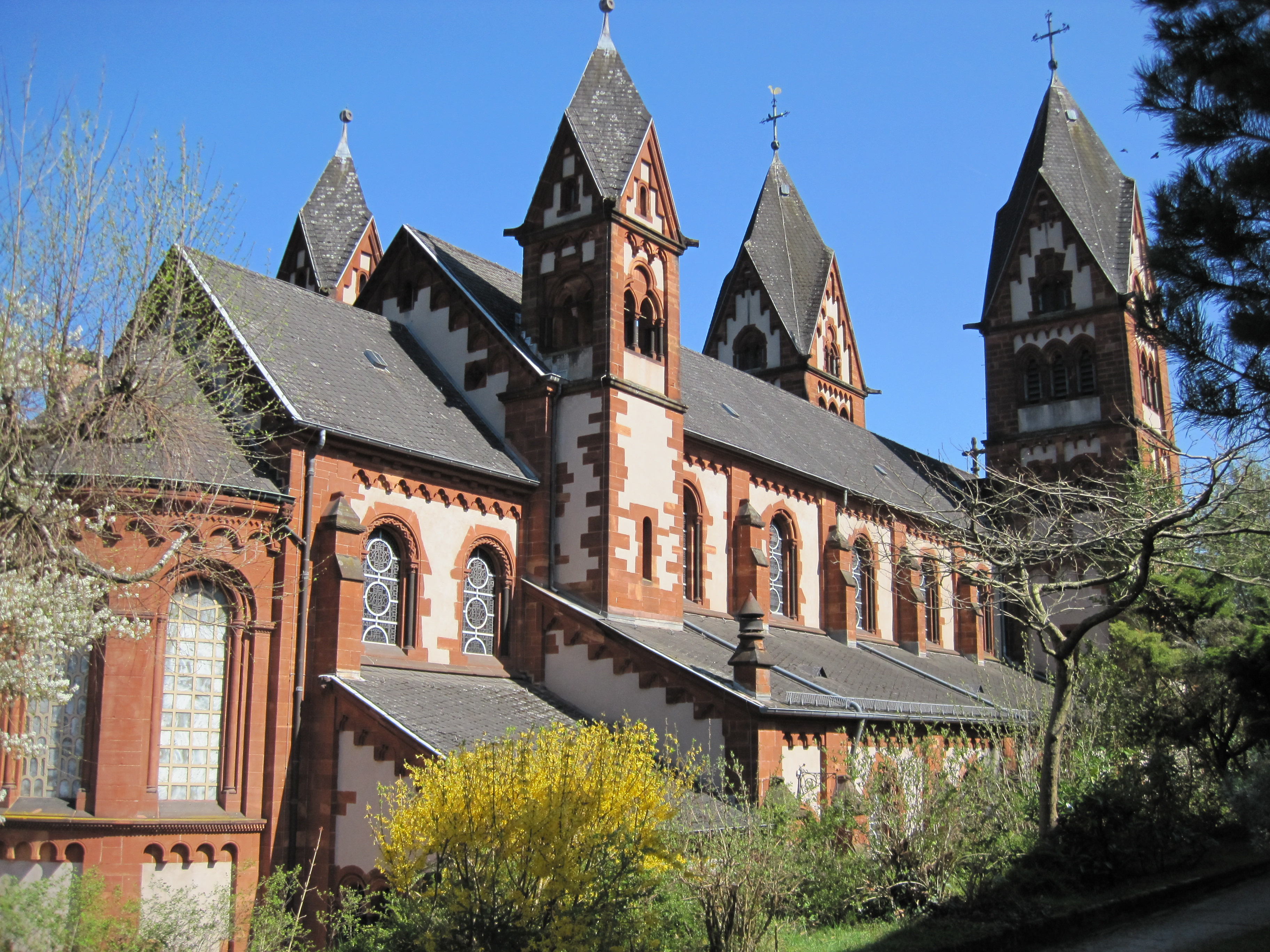 St. Luitwin-Kirche in Mettlach